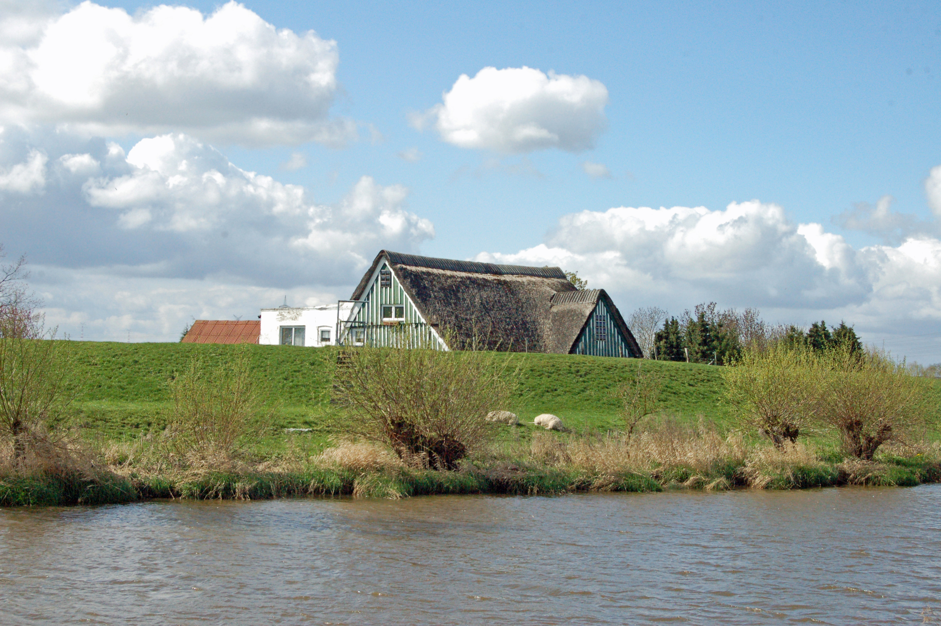 Hier auf der Moorreger Pinnauseite befand sich die ehemalige Schüler-Werft (1735-1929). Bis auf das Wohnhaus der Schülerischen Werft ist kein Gebäude des ehemaligen Betriebs erhalten geblieben.